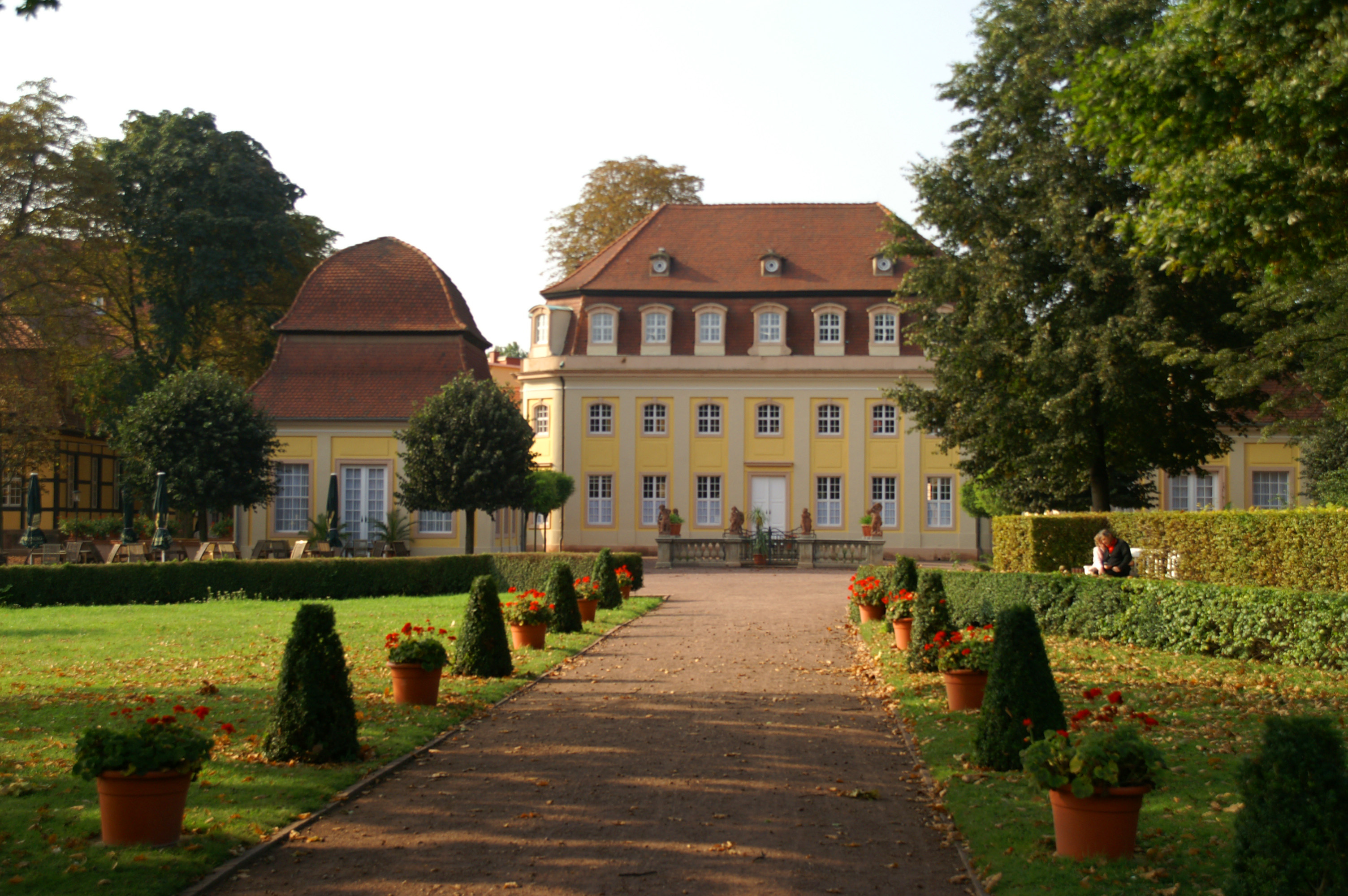 Gardens and spa buildings in Bad Lauchstädt, Sachsen-Anhalt, Germany.